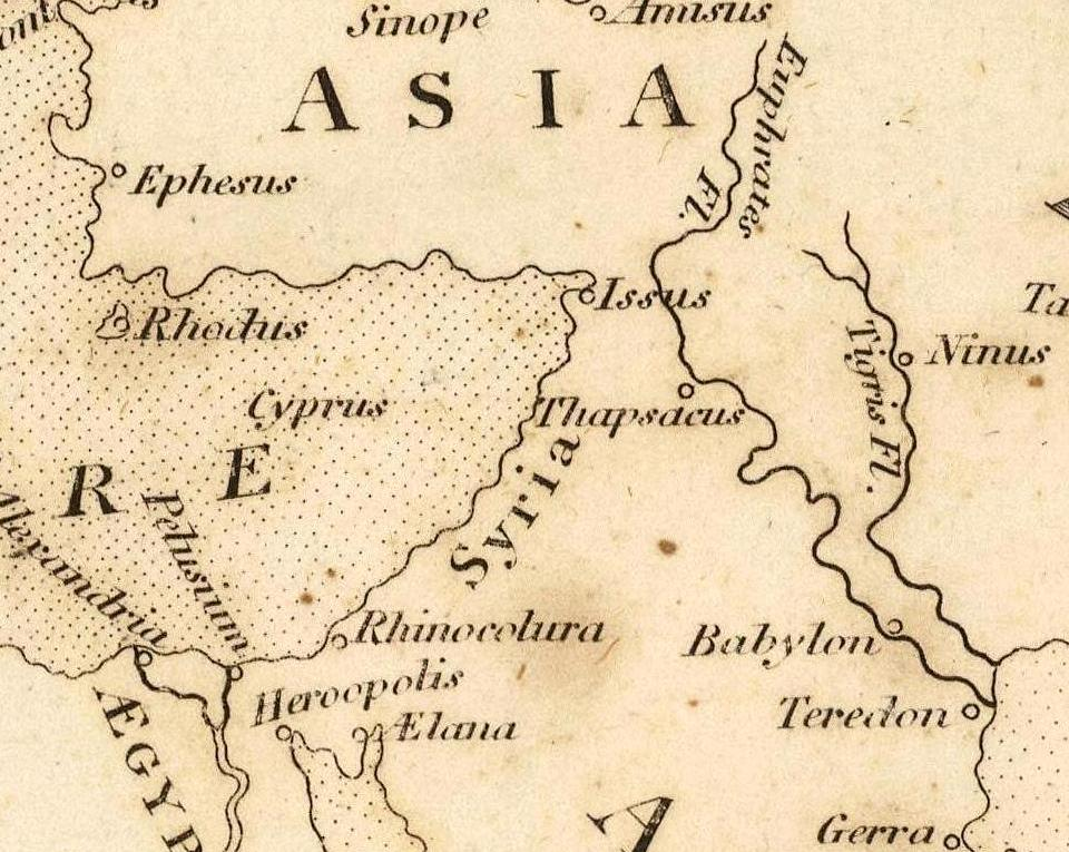 Map of the World According to Strabo (1814). Bye, J., engraver.